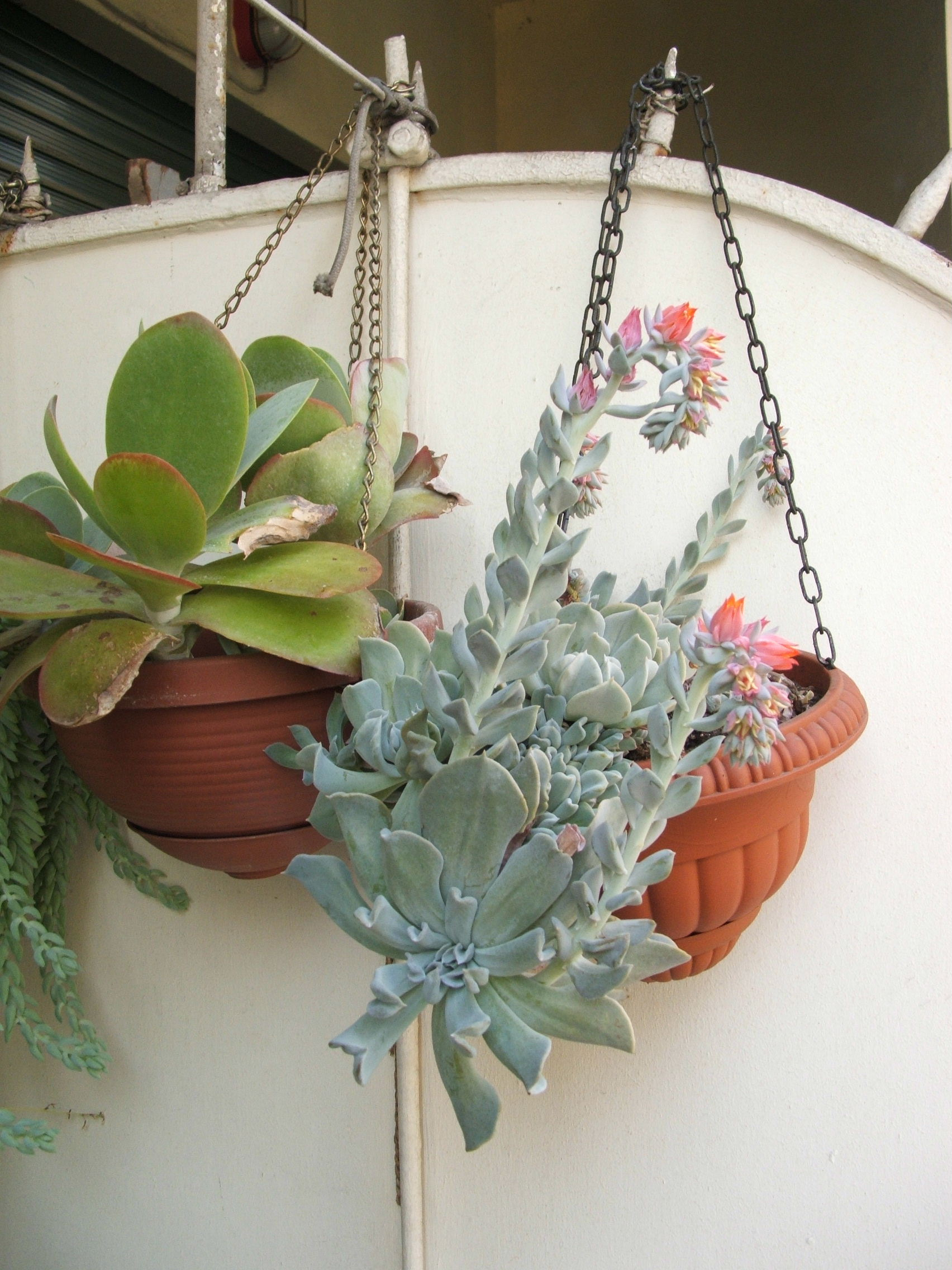 Immagine dalla città di Genova Pianta da giardino - possibile Echeveria (manca conferma)